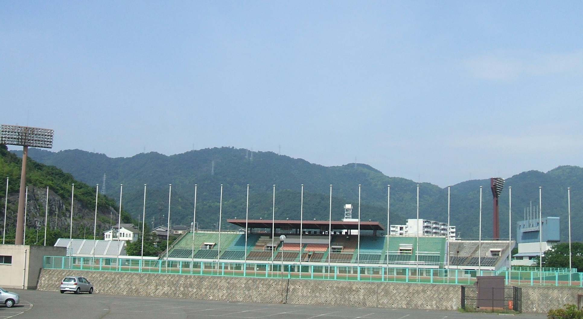 福山市竹ヶ端運動公園陸上競技場の外観